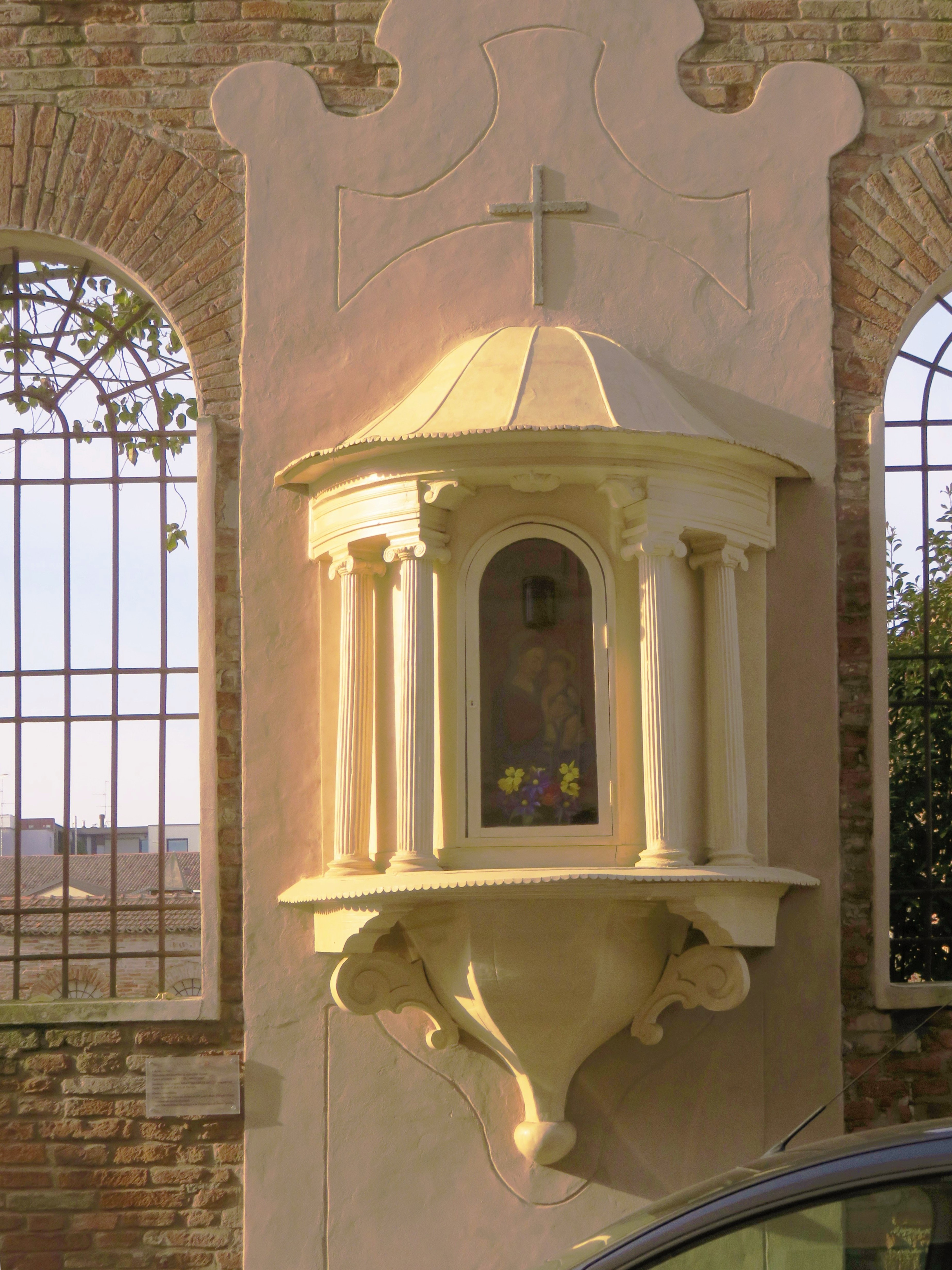 Edicola votiva di Madonna con Bambino, su supporto ligneo, restaurata anche grazie all'intervento di Ferrariae Decus. Restauro del 2017 eseguito da Paola Tosi del C.R.P.A di Ferrara